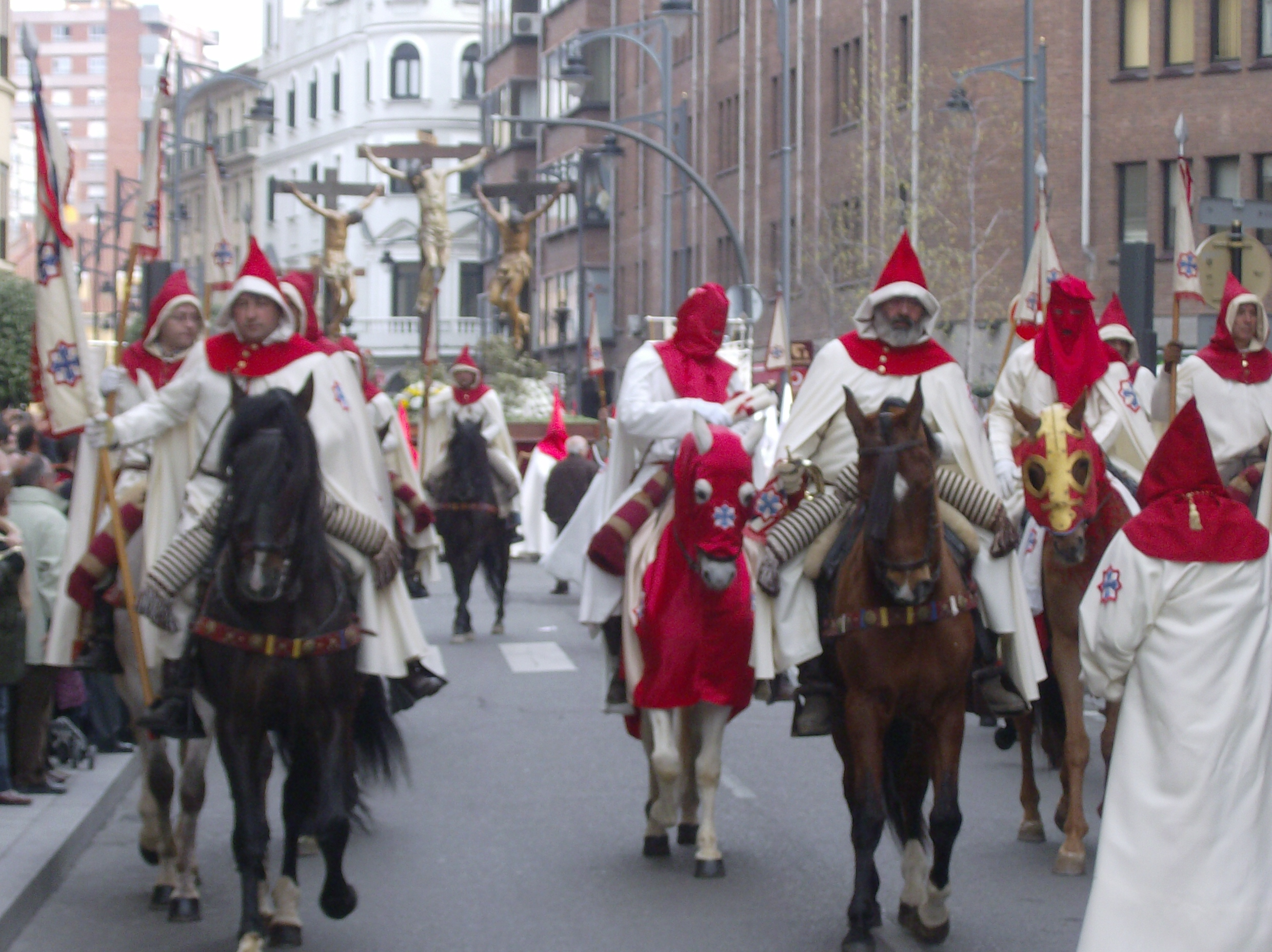 Pregon de la Cofradia de las Siete Palabras (Valladolid)